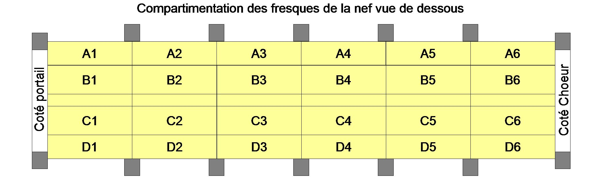 Schéma de compartimentation permettant de situer les fragments des fresques de l'église St Savin